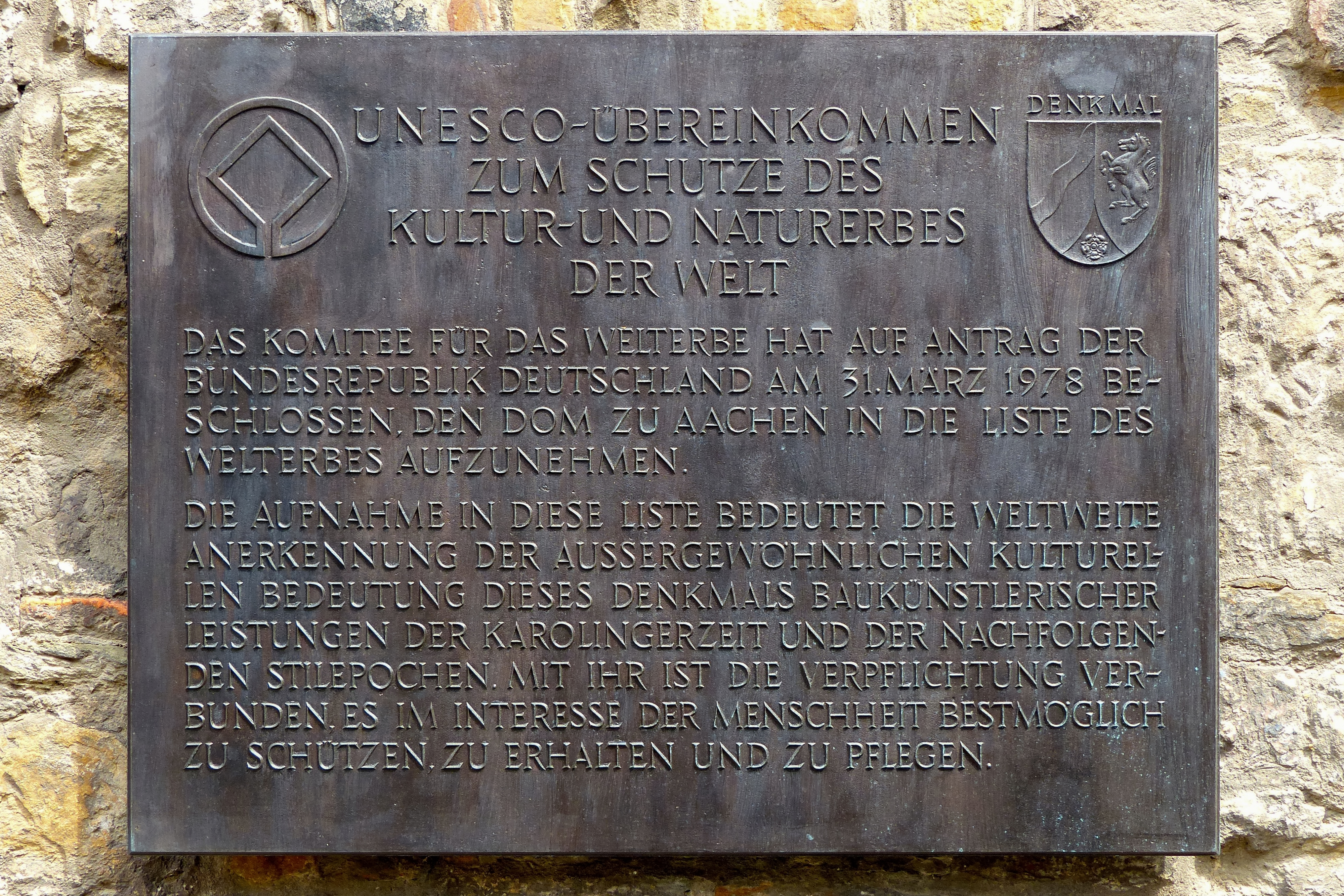 Aachener Dom: Unesco-Plakette im Atrium des Domes